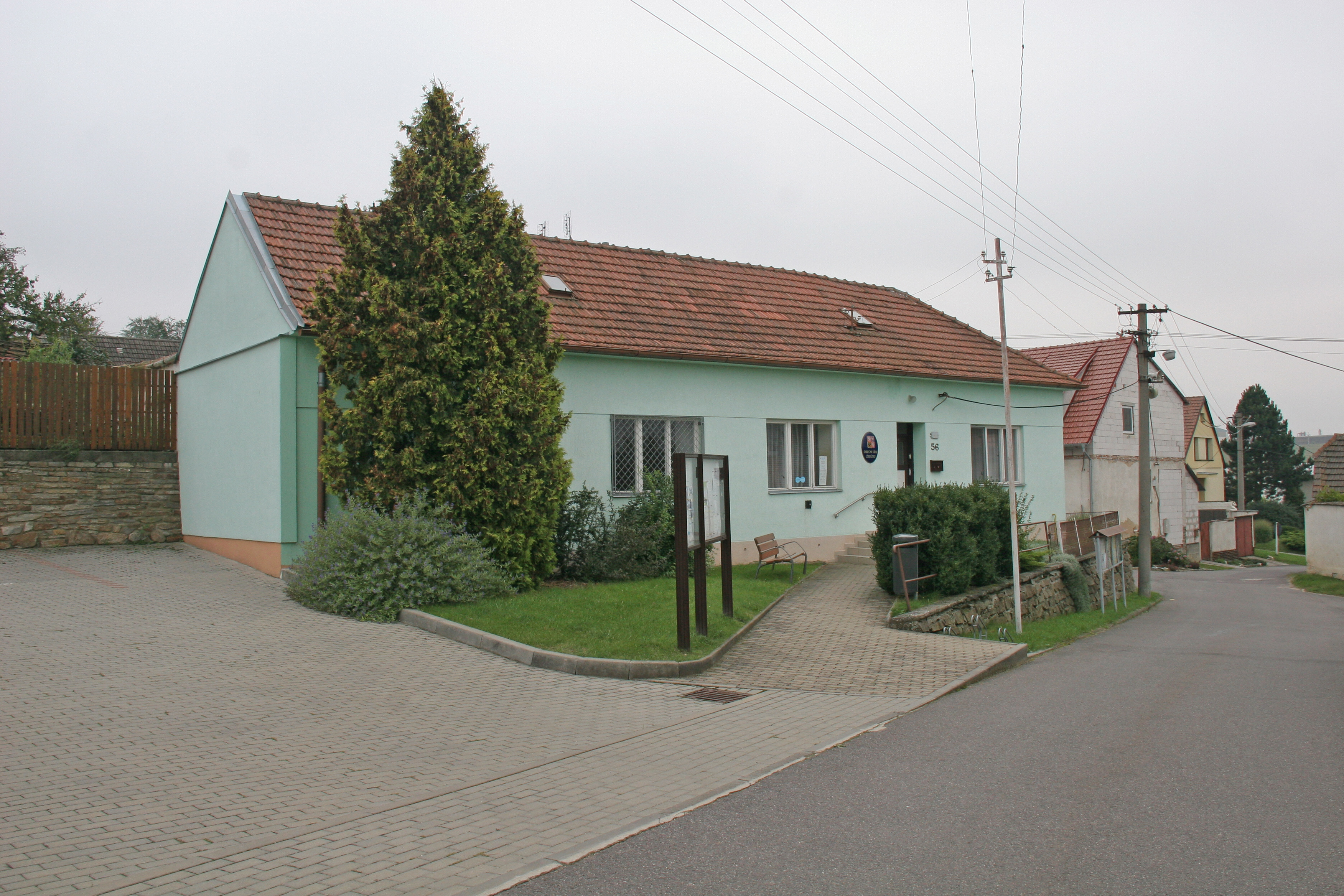 Žerůtky obecní úřad